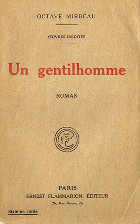 couverture d'Un gentilhomme, d'Octave Mirbeau (1848-1917)